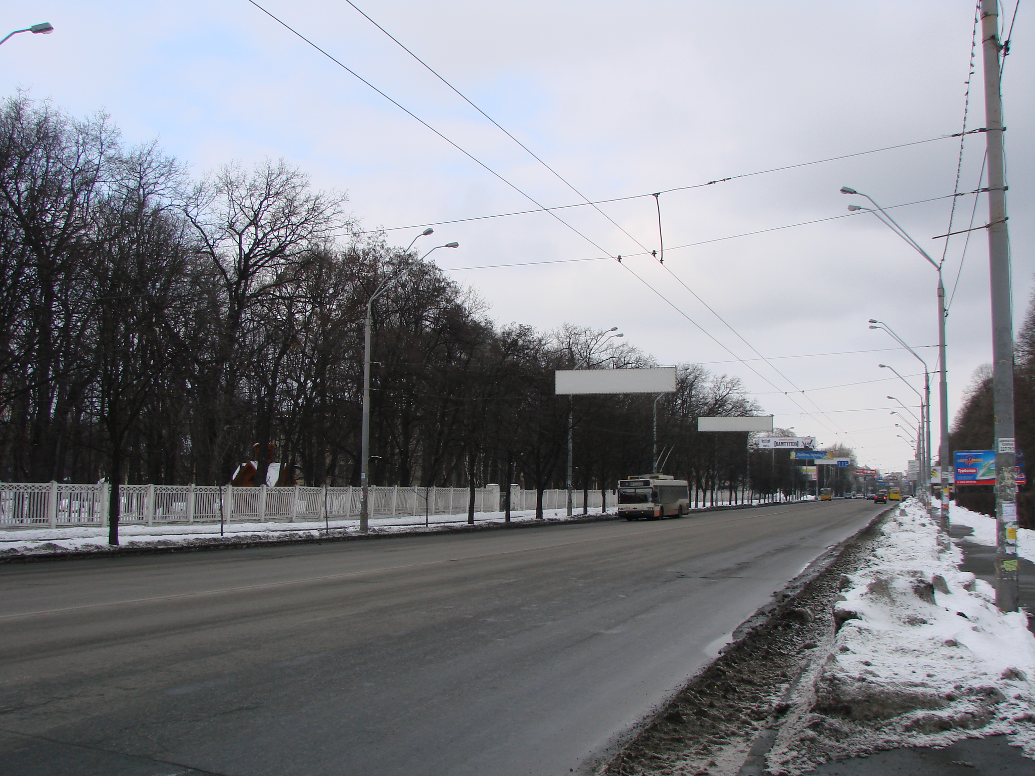 Повітрофлотський проспект у Києві